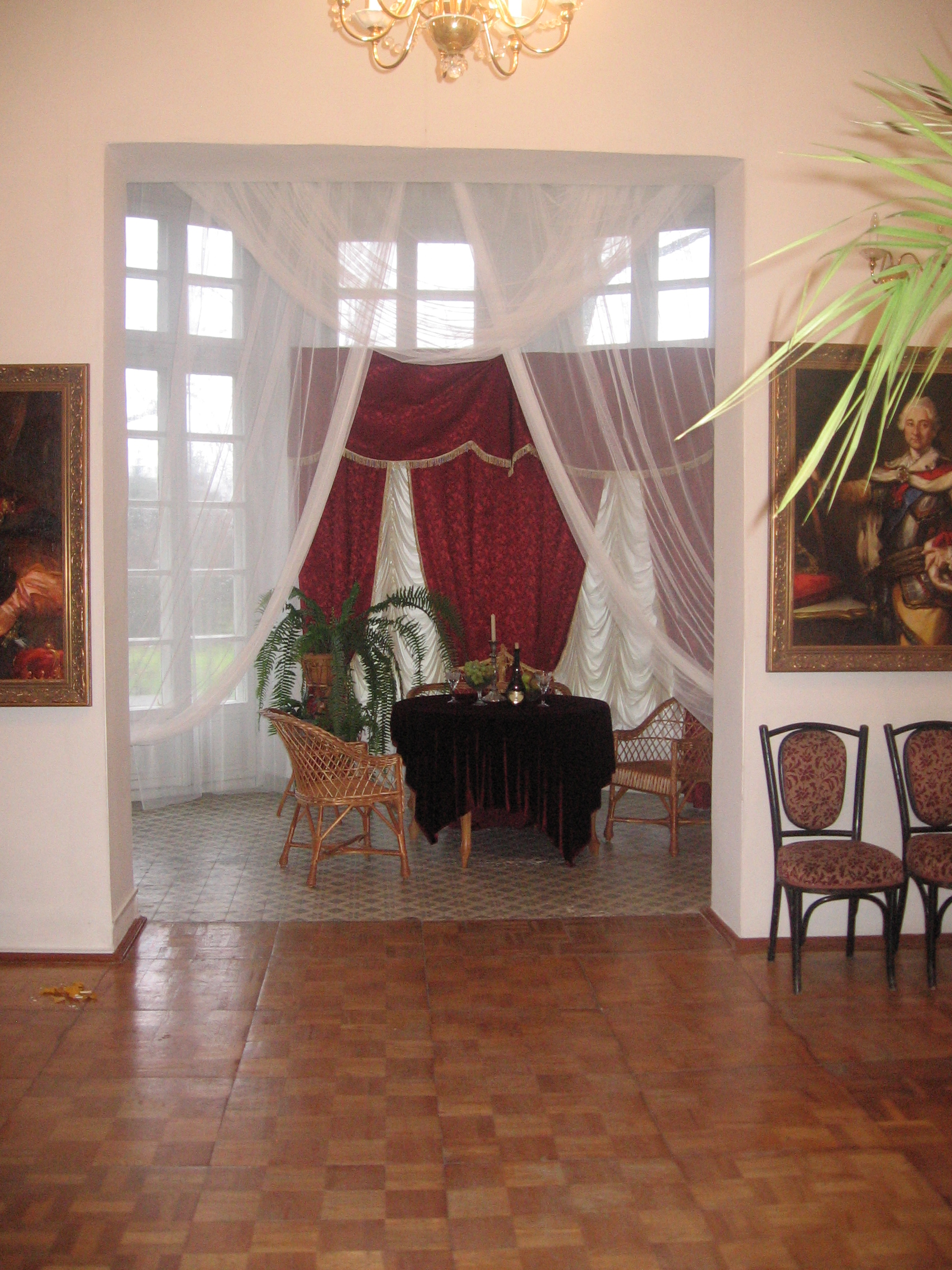 Беларуская (тарашкевіца): Интэр'еры Пружанскага палацыка пад час здымак тэлефільма "Талаш" (Беларусьфільм) This is a photo of Belarusian heritage monument. Reference number: 112Г000585 ( WLM)